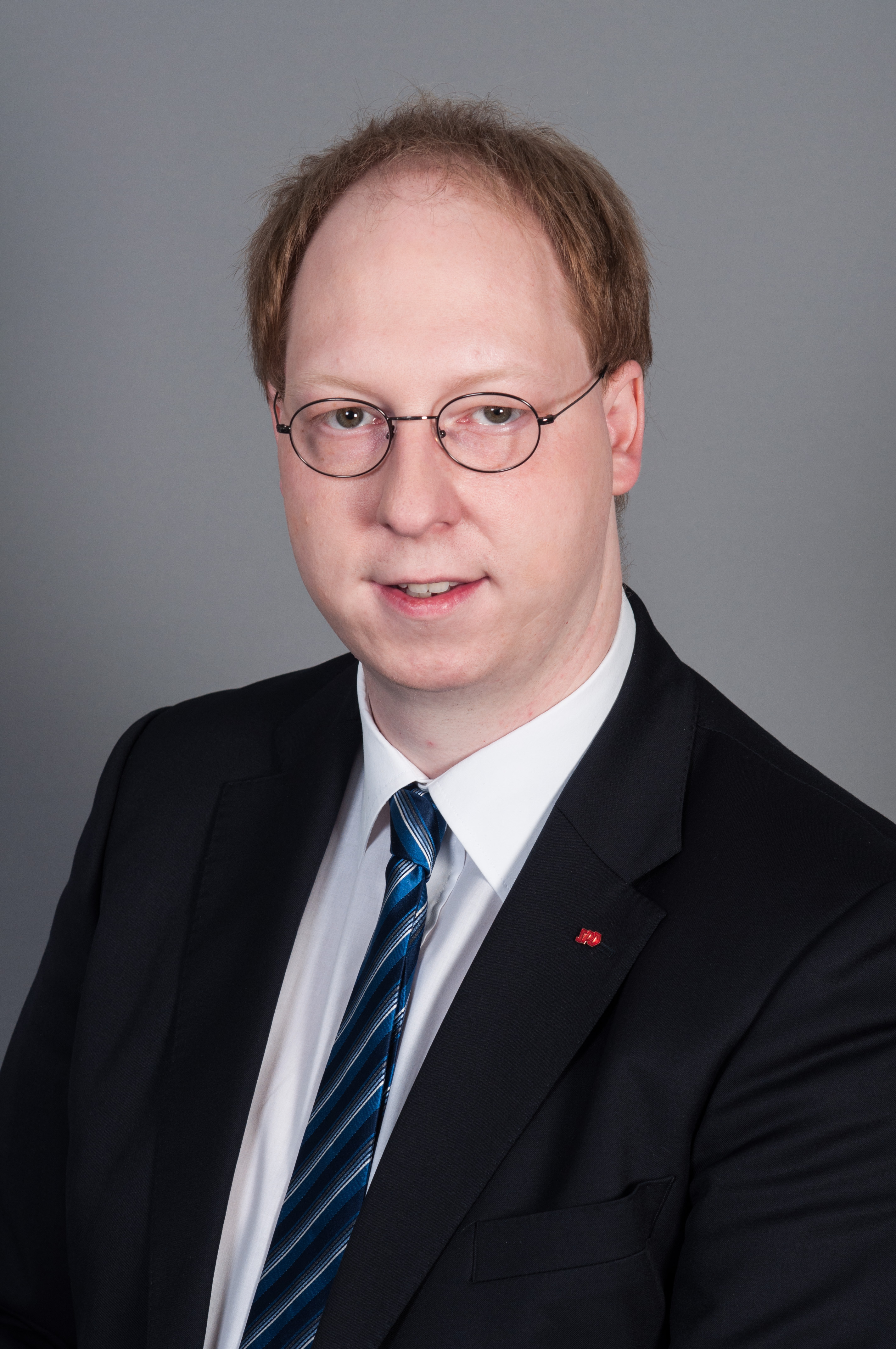 Matthias Ilgen (SPD), MDB